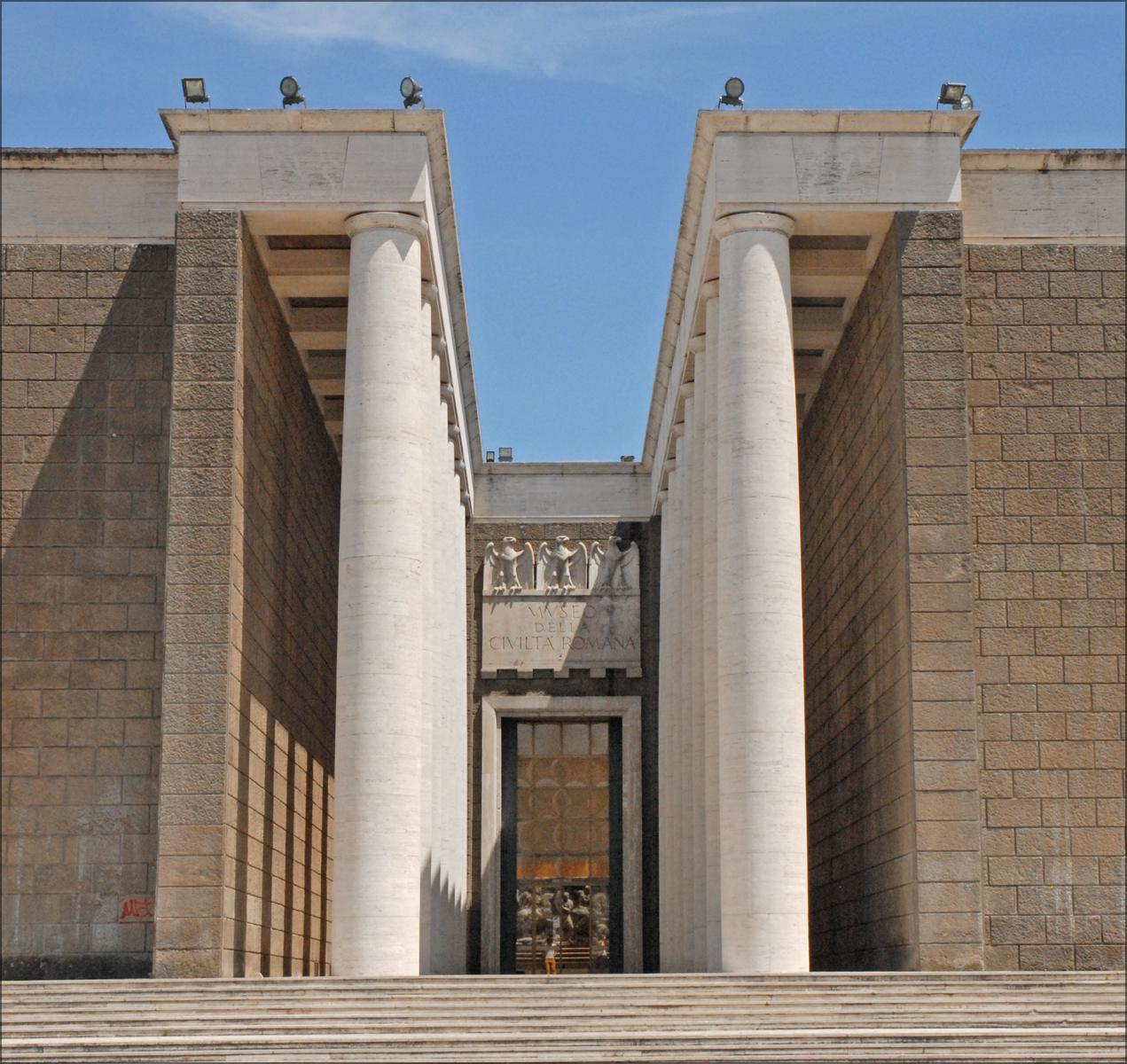 L'entrée du musée de la civilisation romaine (Museo della Civiltà Romana) jusqu'à la fin de l'Empire. Ce musée est installé à l"EUR dans deux bâtiments datant de l'époque fasciste et reliés par un portique. Il comprend de très nombreuses reproductions et maquettes de la Rome antique, classées par ordre chronologique, depuis les origines à la fin de l'Empire romain. Les points forts de ce musée sont : la maquette de la Rome archaïque (Vème siècle av. J.C.), la maquette de Rome au 1/250 à l'époque de Constantin (306-337) et les moulages de l'ensemble de la colonne Trajane qui retracent les épisodes de la guerre de Trajan contre les Daces. _______________ La création du nouveau quartier de Rome, appelé EUR : Esposizione Universale di Roma, a été décidée en 1936 par Benito Mussolini (1883-1945) pour célébrer le 20ème anniversaire de la marche sur Rome par une Exposition Universelle qui devait se tenir en 1942. Quelques bâtiments ont été construits mais les travaux d'aménagement et de construction ont été stoppés par la guerre. Les architectes chargés du projet étaient : Marcello Piacentini entouré de Giuseppe Pagano, Luigi Piccinato, Ettore Rossi, Luigi Vietti. Les travaux ont repris en 1951 avec l'ambition de faire de l'EUR un quartier d'affaires associé à une zone urbaine d'habitation reliée par le métro à Rome et par le train à Ostie.